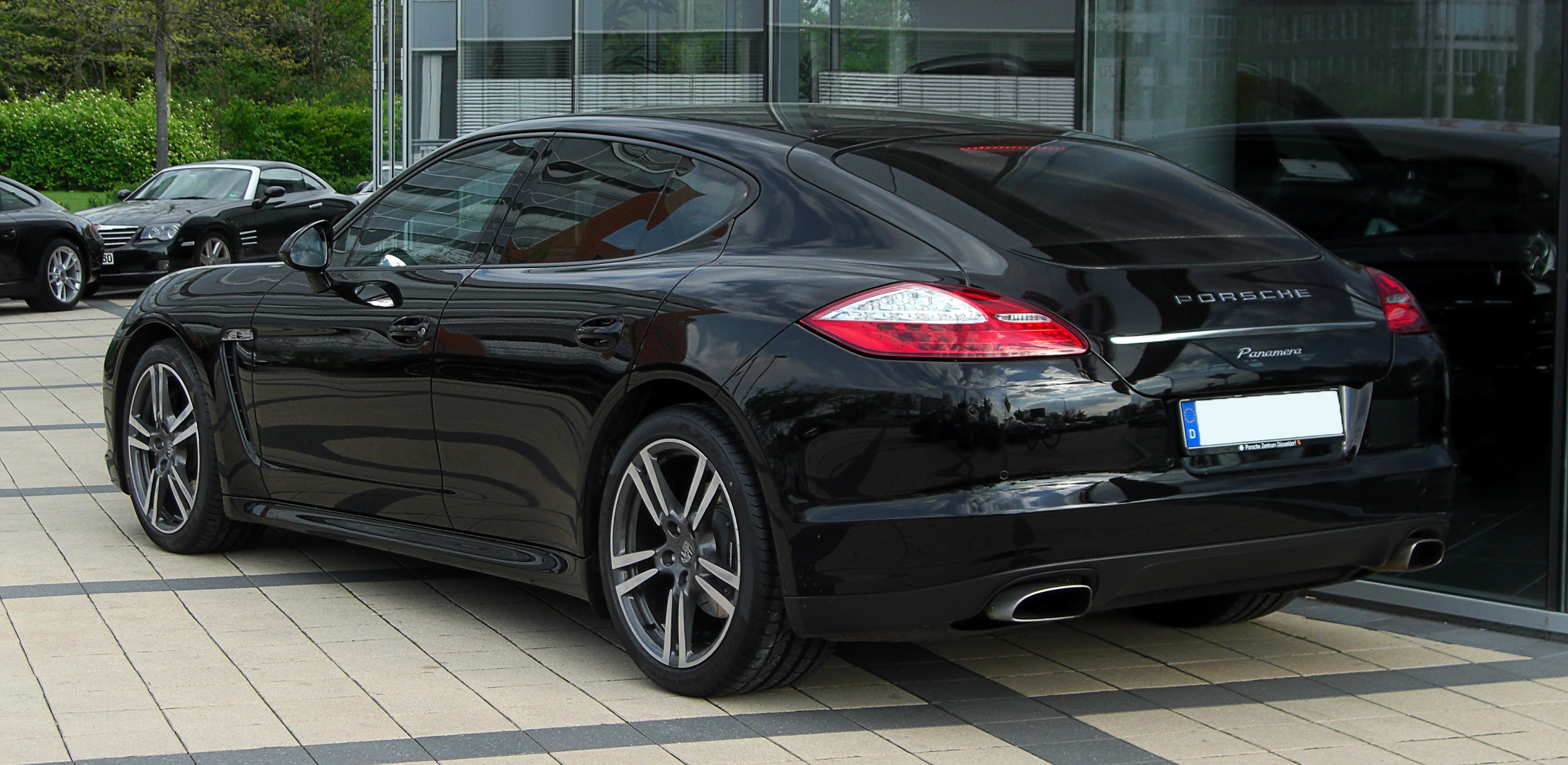 Porsche Panamera (970)